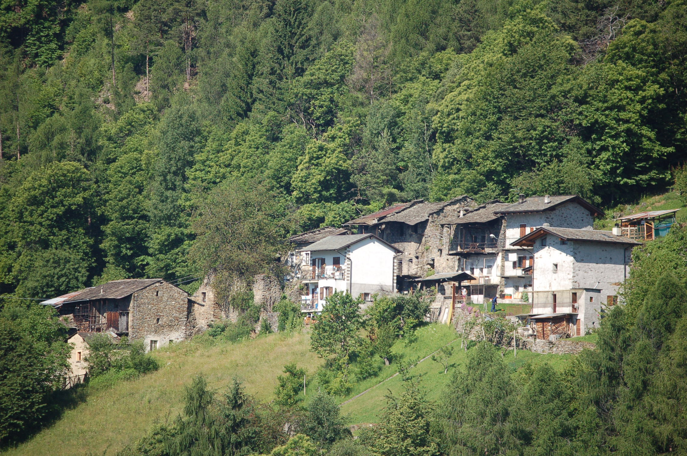 contrada Piazzo a Baruffini Fraz. di Tirano prov. Sondrio